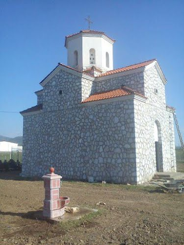 Црквата „Св. Петка“ во с. Ново Лагово, Прилепско